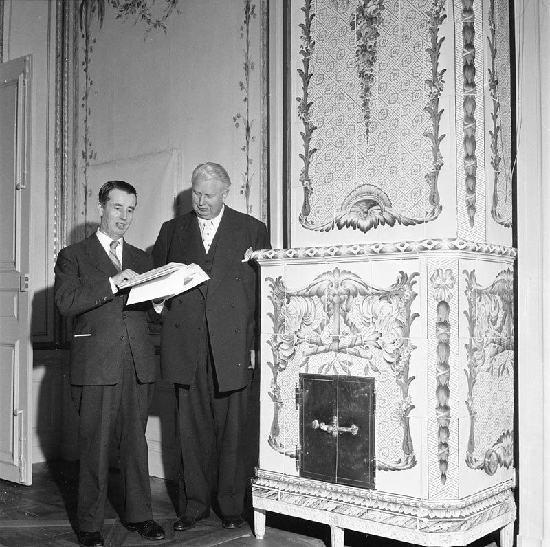 Sturehofs Slott har restaurerats. Dr Gösta Selling och Stadsfullmäktiges ordförande Carl Albert Andersson vid en av slottets alla Mariebergskakelugnar